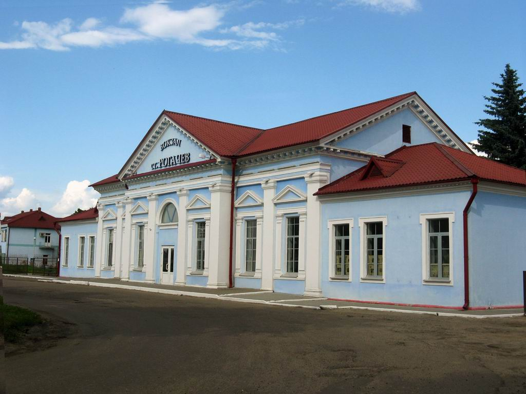 Беларуская (тарашкевіца): Рагачоў